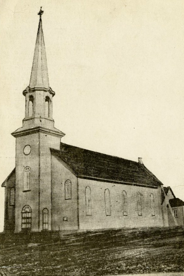 Église de Saint-Zacharie en 1910